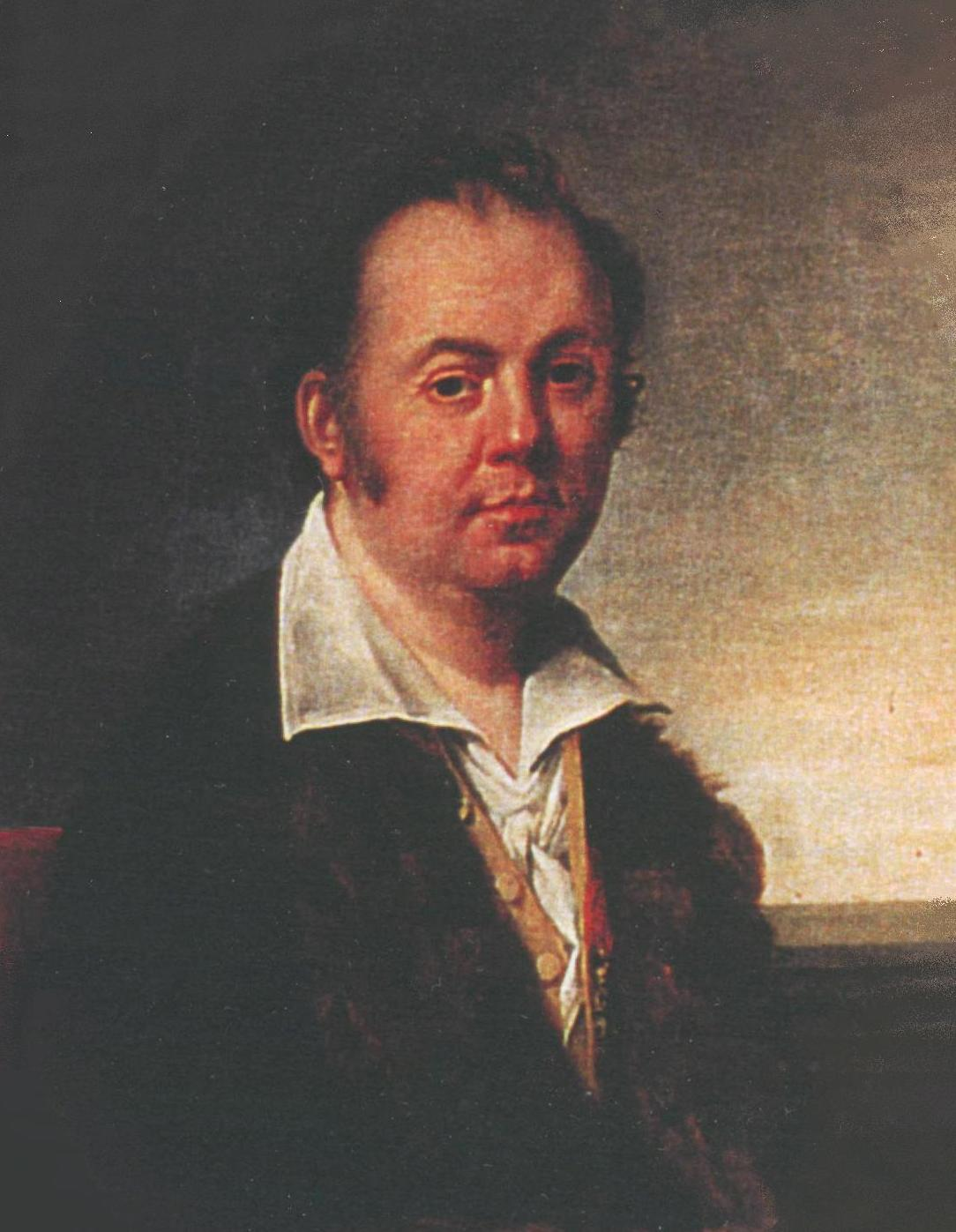 huile sur toile, reprod. modifiée